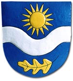 Logo města Planá nad Lužnicí.